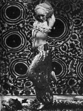 Tórtola Valencia en la revista Caras y Caretas 09/10/1915, n. 888, página 60. "Tórtola Valencia, en un baile indio, que ha despertado gran entusiasmo en New-York."